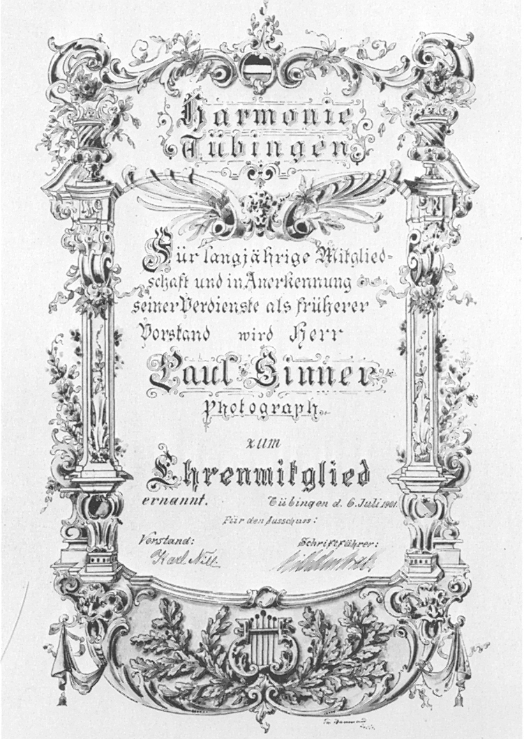 Ehrenurkunde des Gesangsvereins Harmonie für Paul Sinner auf einem von lithographierten Formular von Hermann Baumann